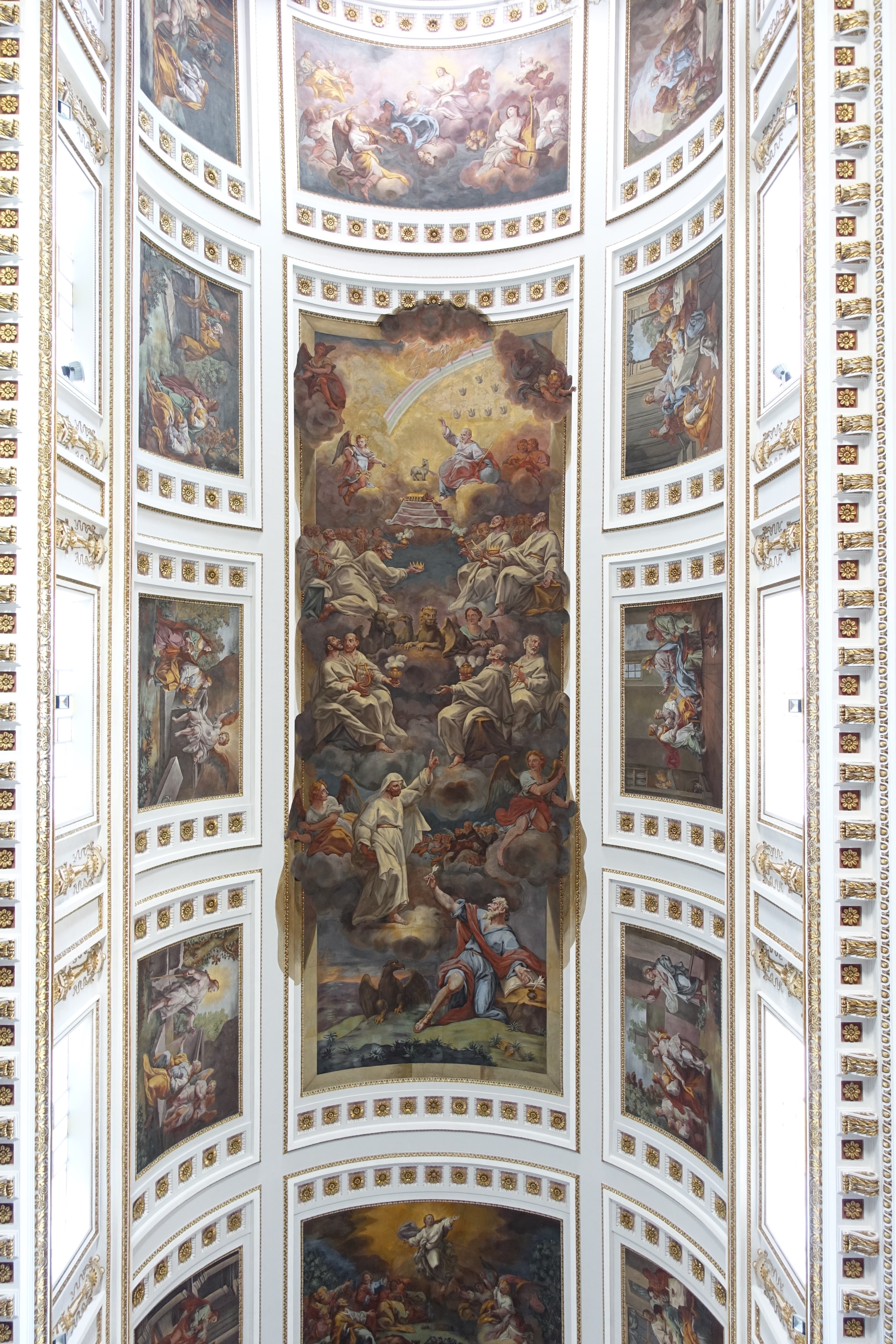 Plafon